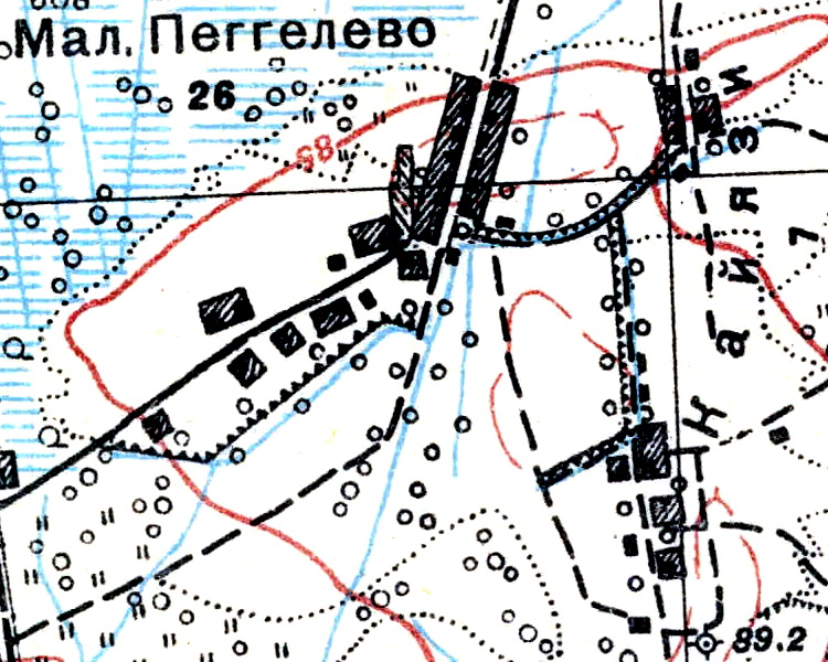 Топографическая карта Ленинградской области, квадрат О-36-13-А-б (Пос. Тайцы), деревня Малое Пегелево